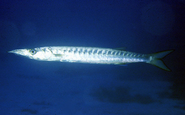 Sphyraena viridensis (Cuvier, 1829)